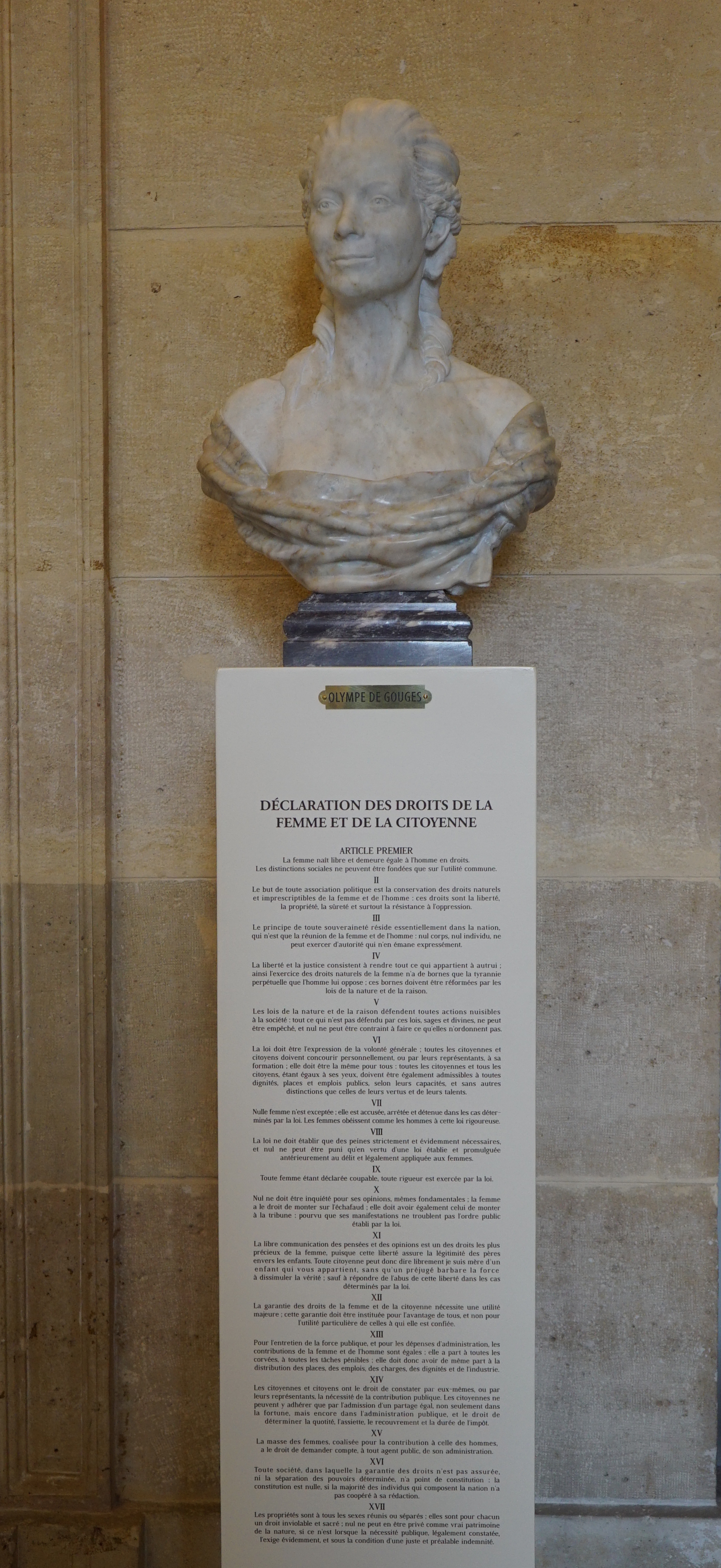 décor du palais Bourbon-Condé.